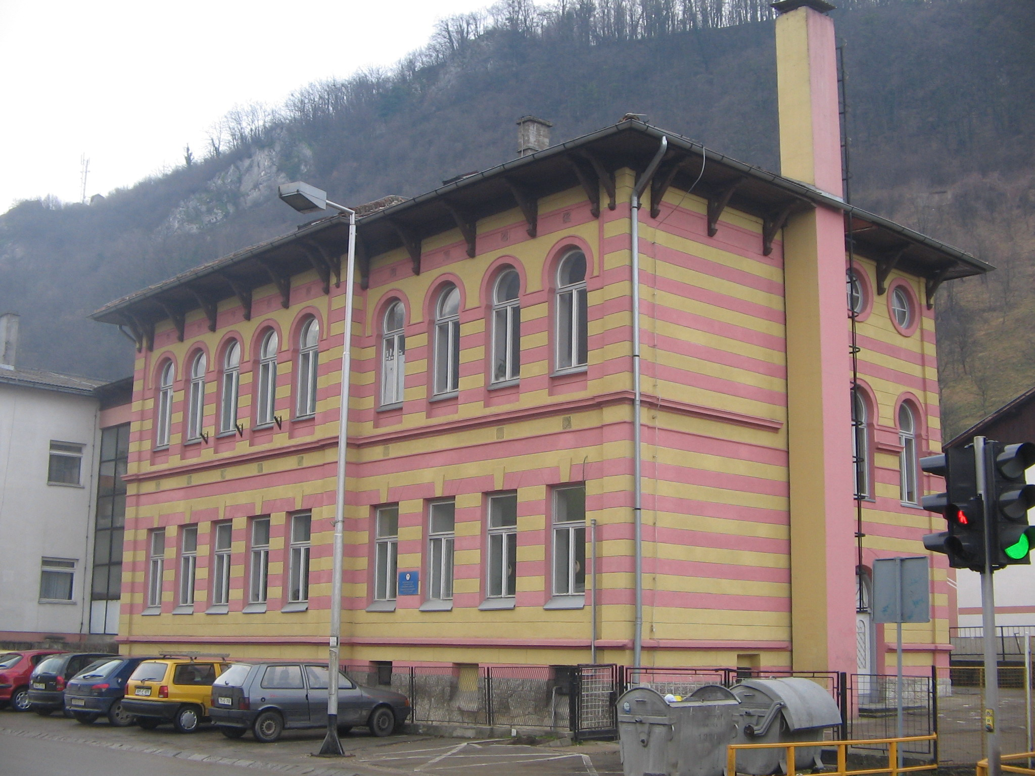 Основна школа Бранислав Нушић у Српским Топлицама (Бања Лука)